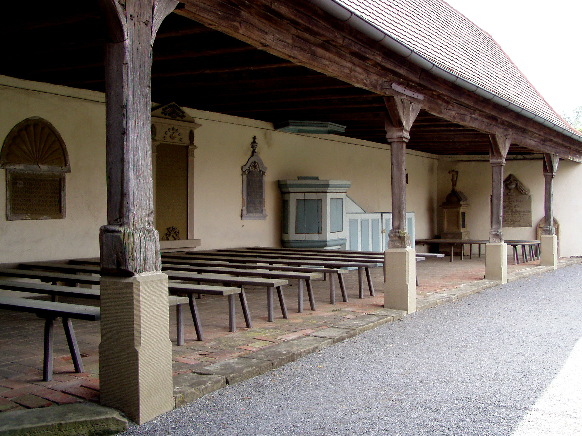 Friedhofarkaden von Abtswind mit Friehofkanzel